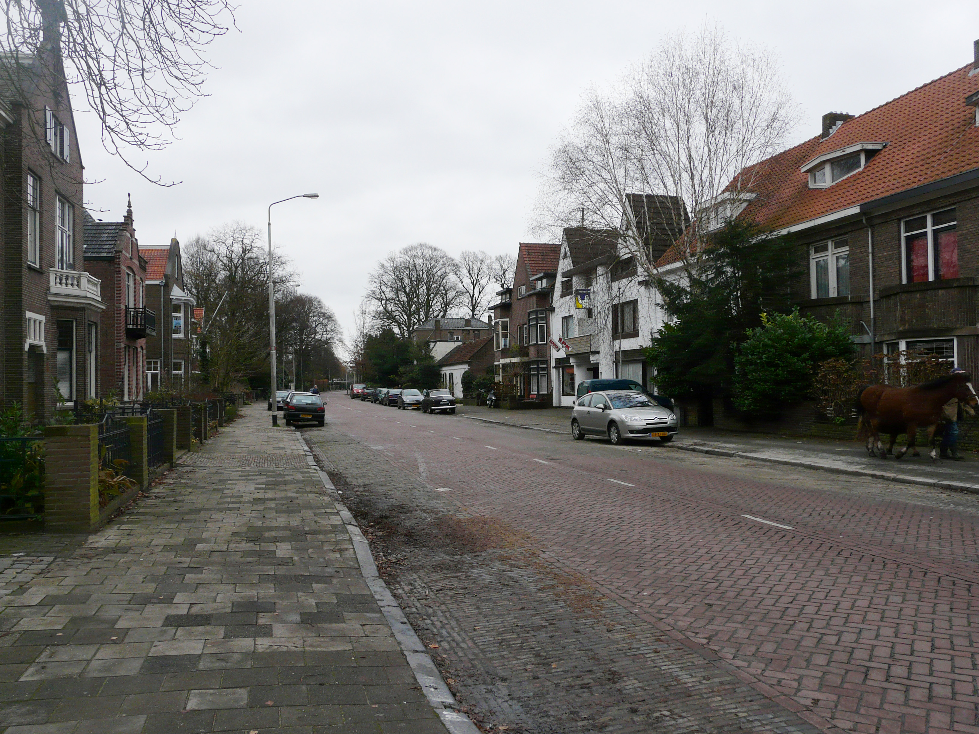 Zicht op een deel van de Haagweg in Princenhage in het zuidwesten van Breda